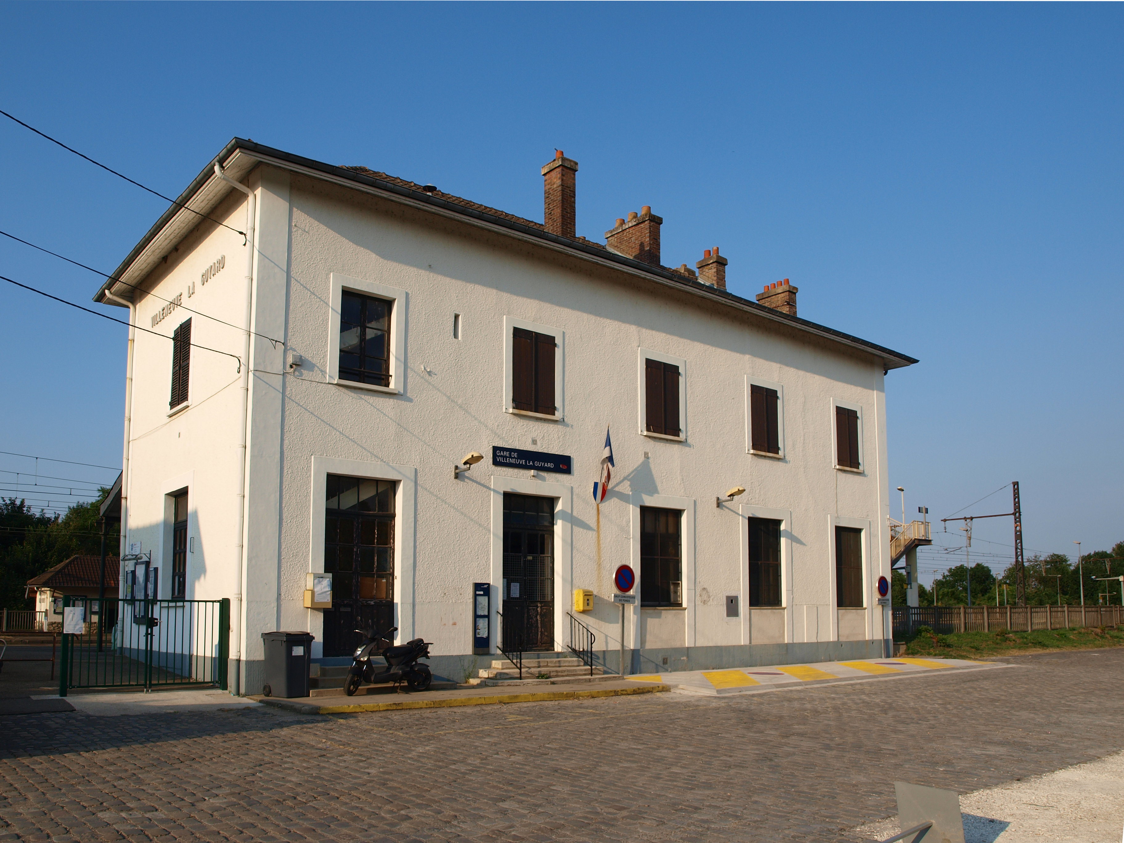 Villeneuve-la-Guyard (Yonne, France) ; la gare.